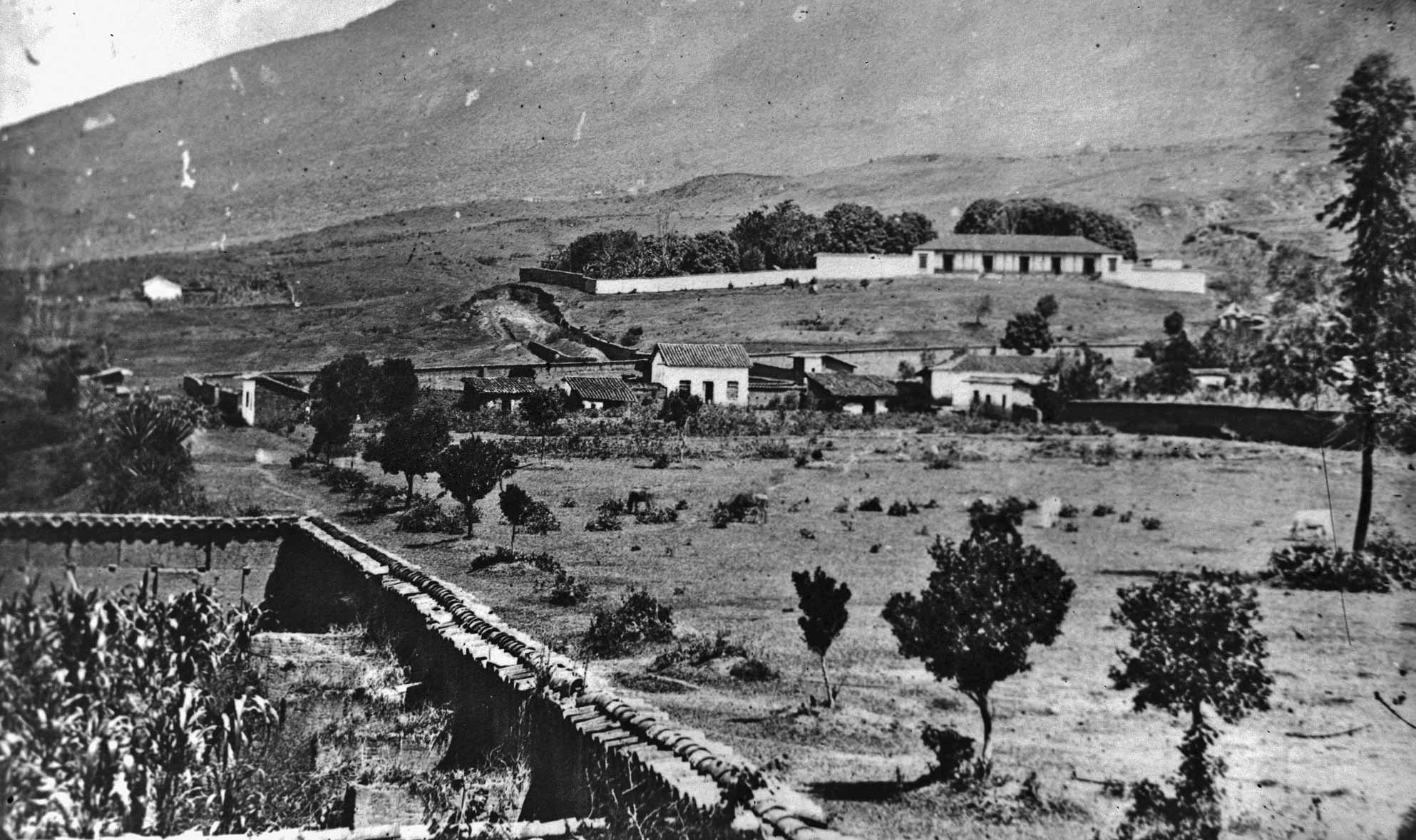 Sector de Villanueva, antes de la construcción de la catedral Metropolitana de Medellín. Al fondo a la izquierda se encuentran los terrenos que actualmente ocupa el barrio Prado.